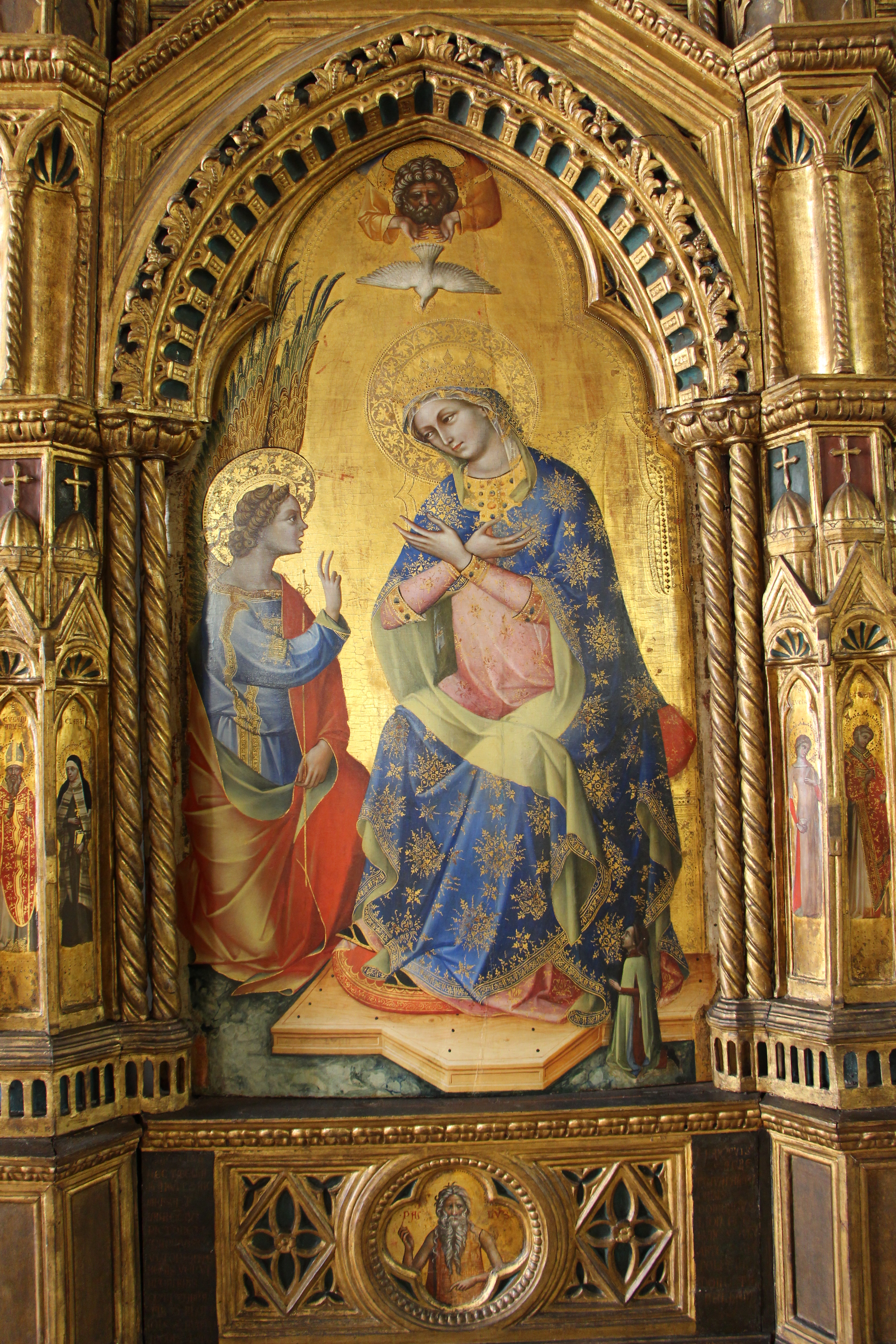 Gallerie dell'Accademia - MIBAC The making of this document was supported by Wikimedia CH. (Submit your project!) For all the files concerned, please see the category Supported by Wikimedia CH. This is a photo of a monument which is part of cultural heritage of Italy.